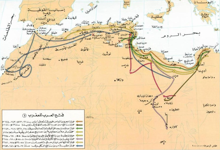 خارطة تُبيِّنُ مسار الفُتوحات الإسلاميَّة لِبلاد المغرب.